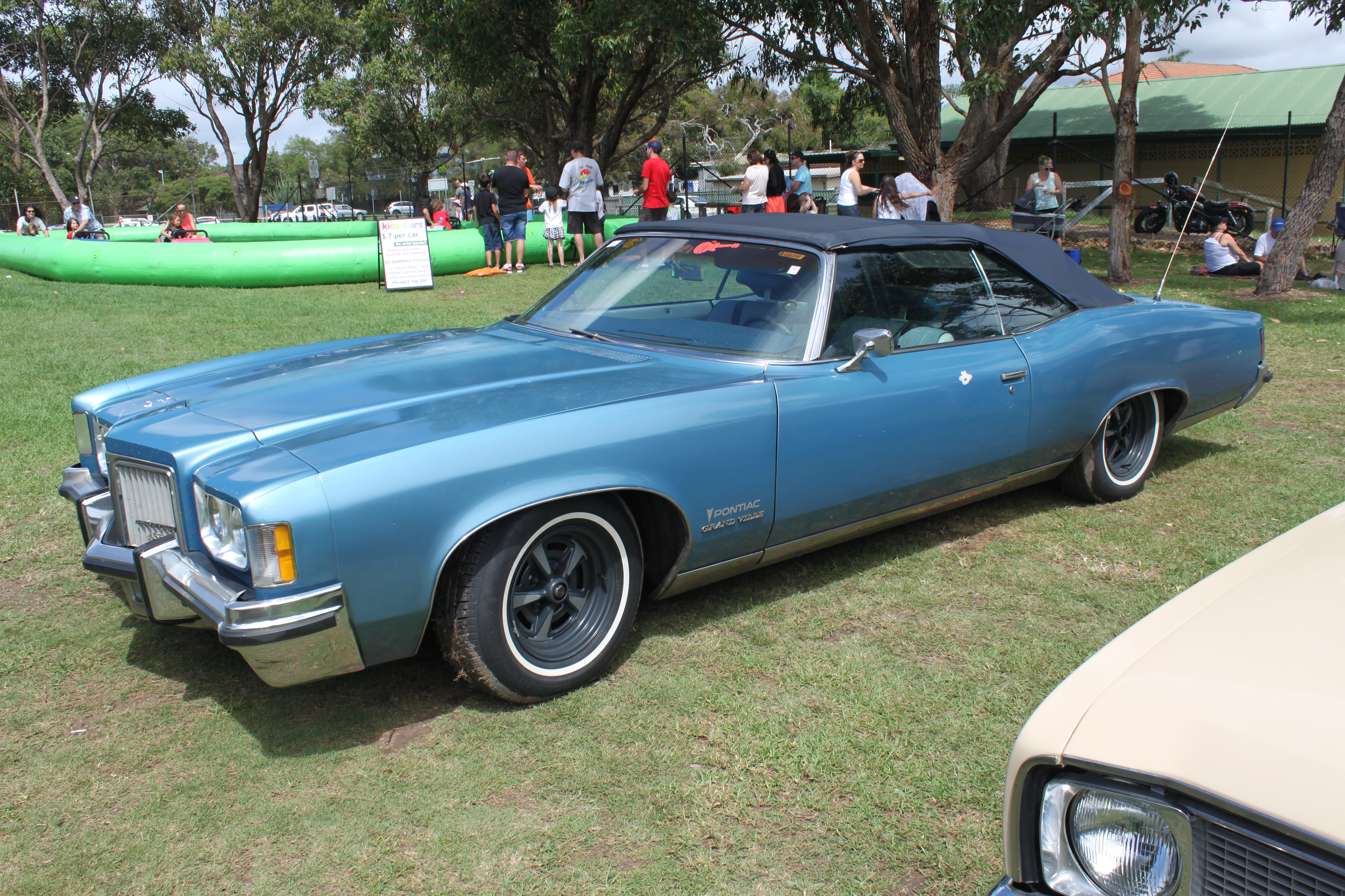 Car & Bike Fest, Pittwater Rugby Park, 2015